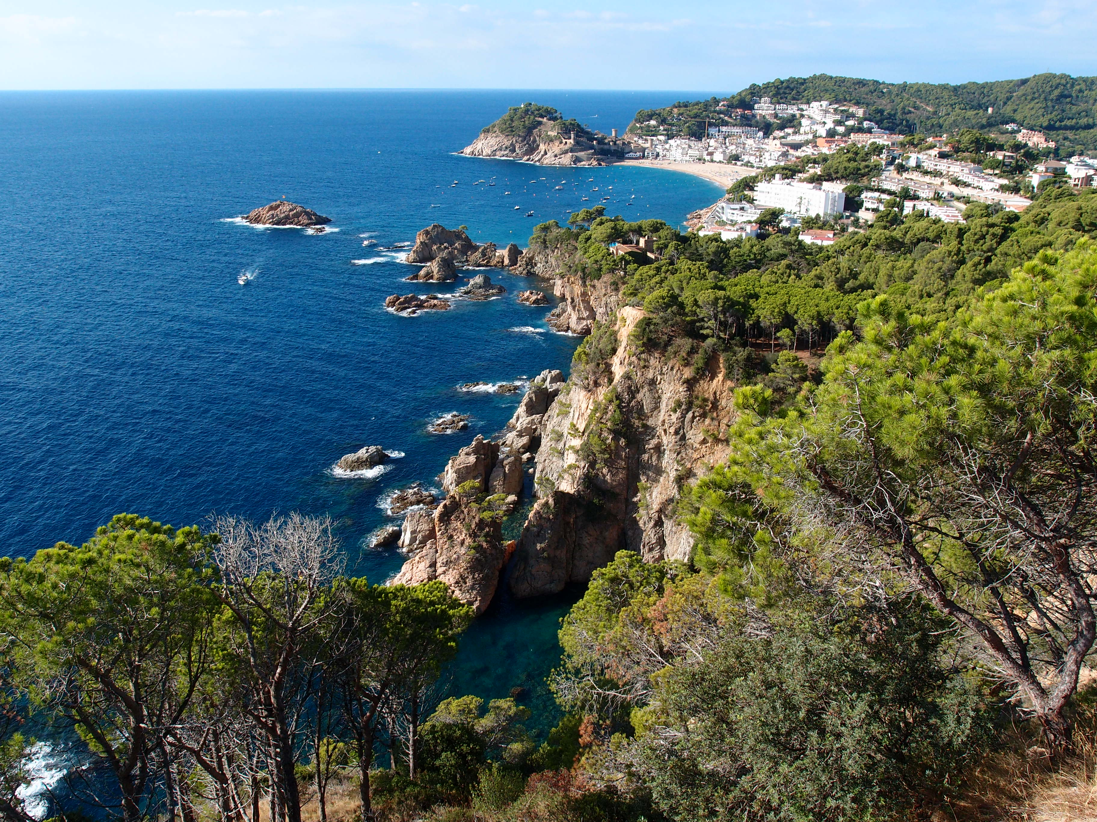 Die Costa Brava (wilde Küste) zwischen Tossa de Mar und Sant Feliu de Guíxols (Katalonien/Spanien) Datum: 20.09.2012 Urheber: M. Pfeiffer alias Benutzer:Gordito1869 Quelle: privates Fotoarchiv des Urhebers